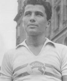 Friedensfahrt, Mannschaft aus Rumänien Zentralbild Repro Qu 2.5.1961 Rumäniens Friedensfahrtmannschaft. Ion Stoica